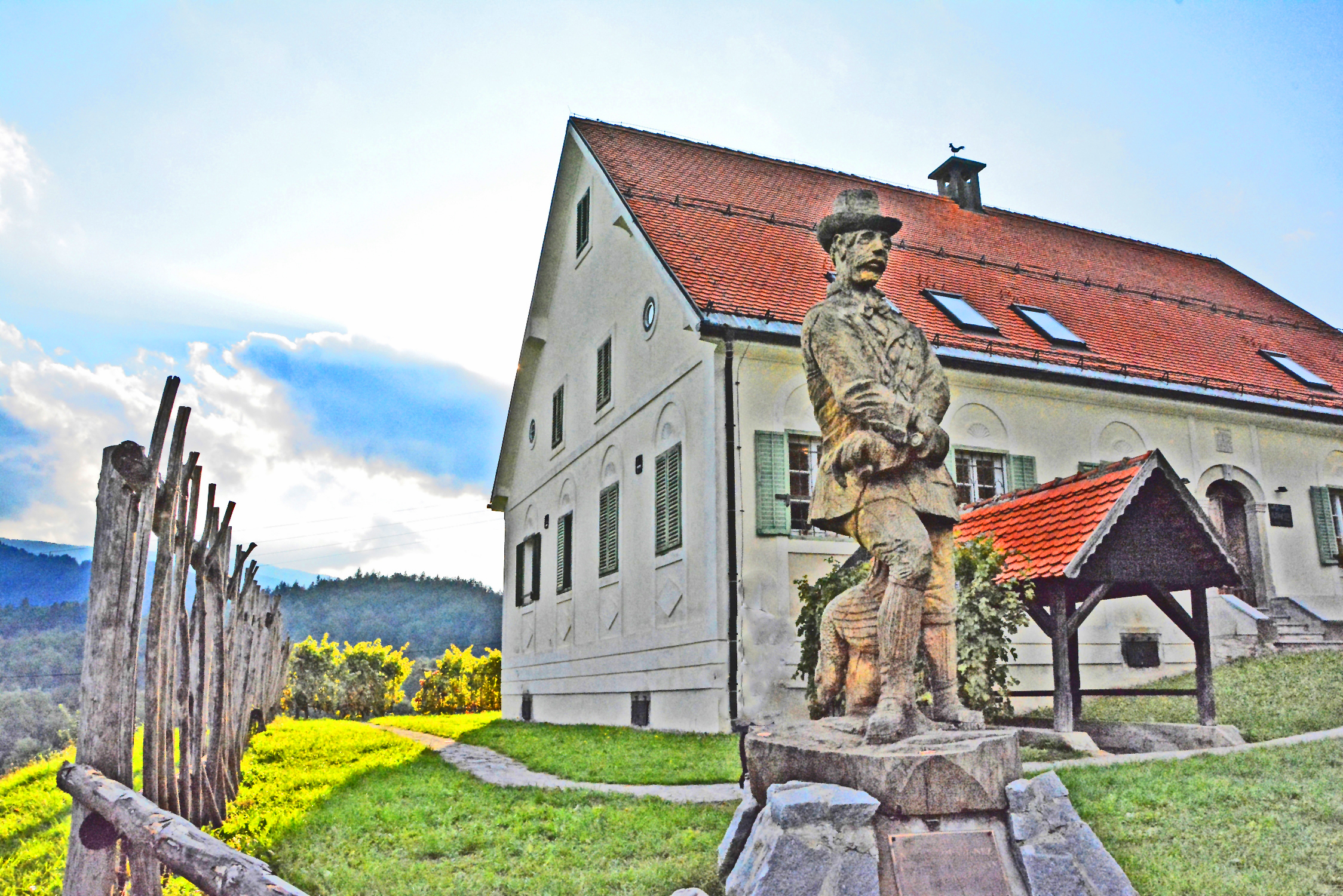 Weingut Meranovo, Pekre-Maribor